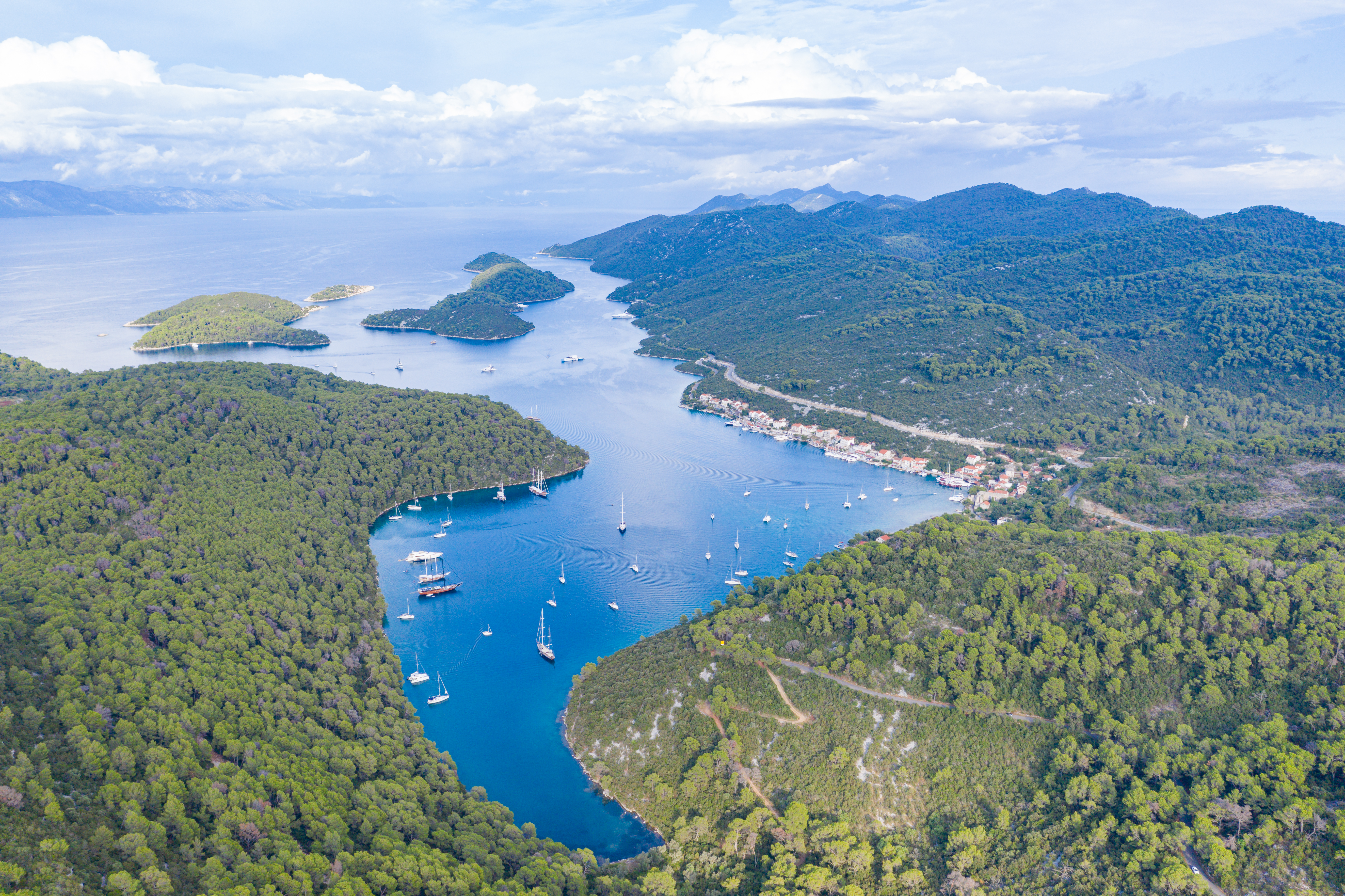 Croatia